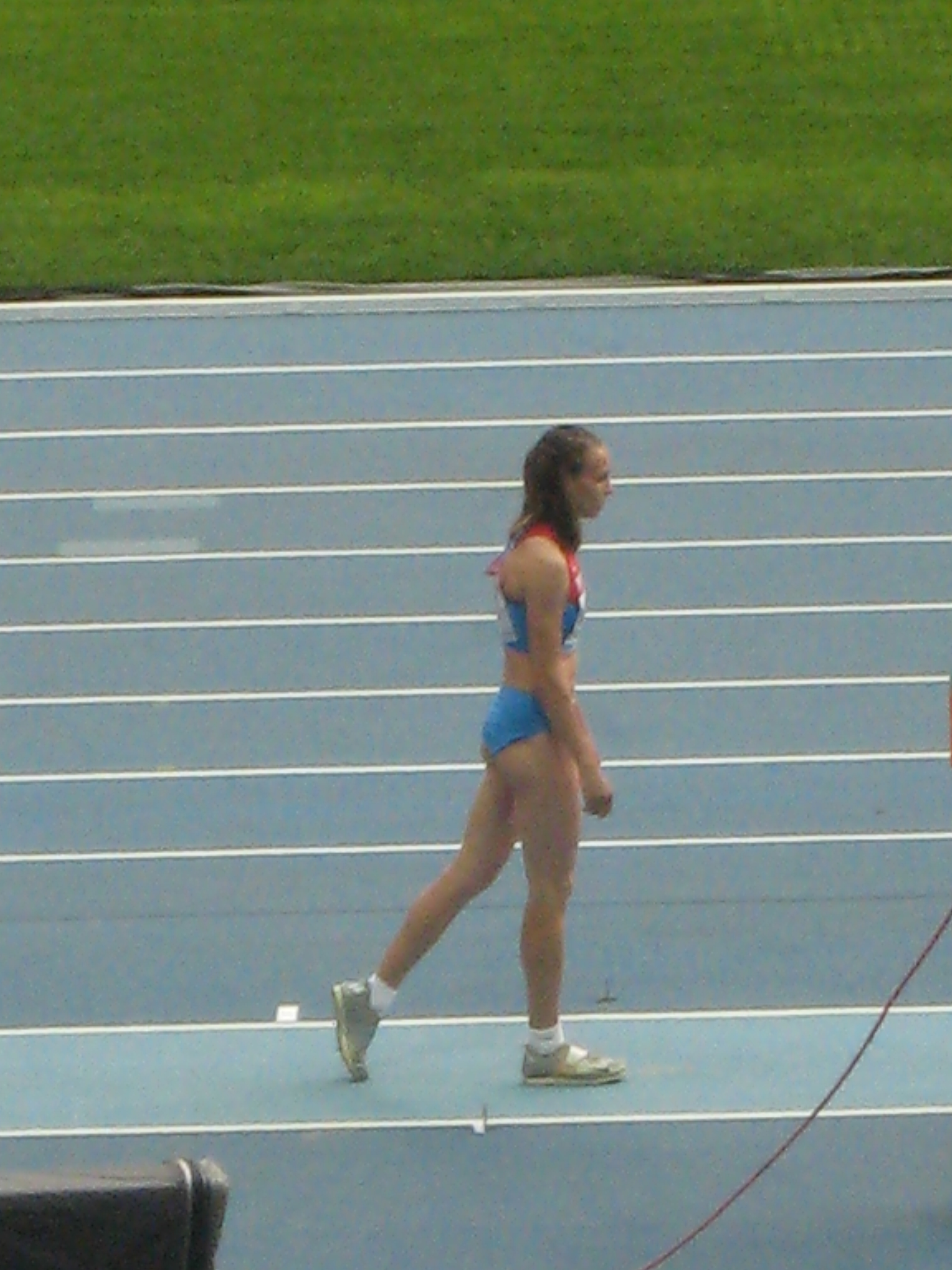 Чемпионат мира по лёгкой атлетике 2013. Российская спортсменка Ирина Гуменюк